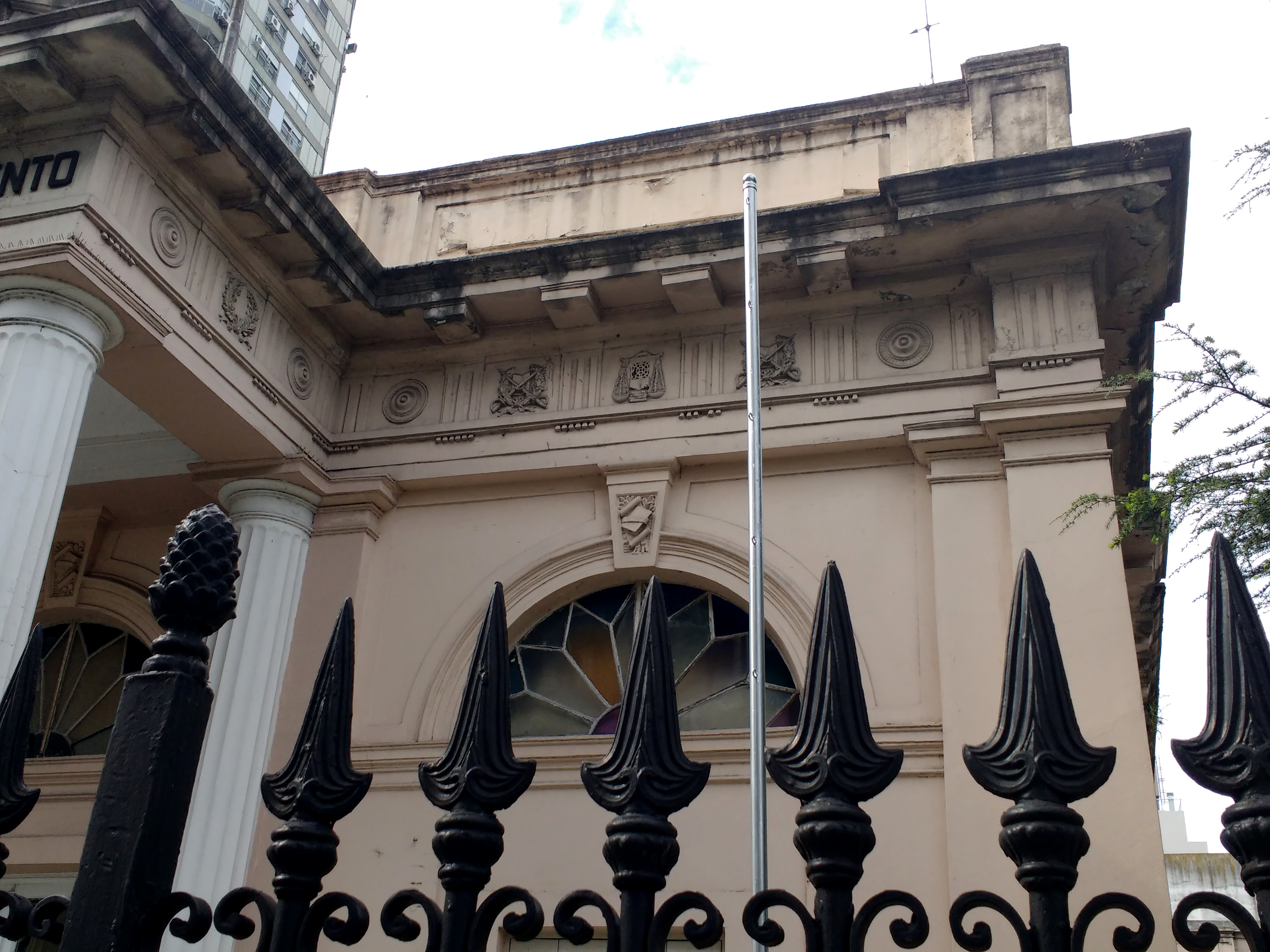 Imagen con el fin de destacar la ornamentación que expone dicho edificio, tanto en su fachada principal como en la lateral.